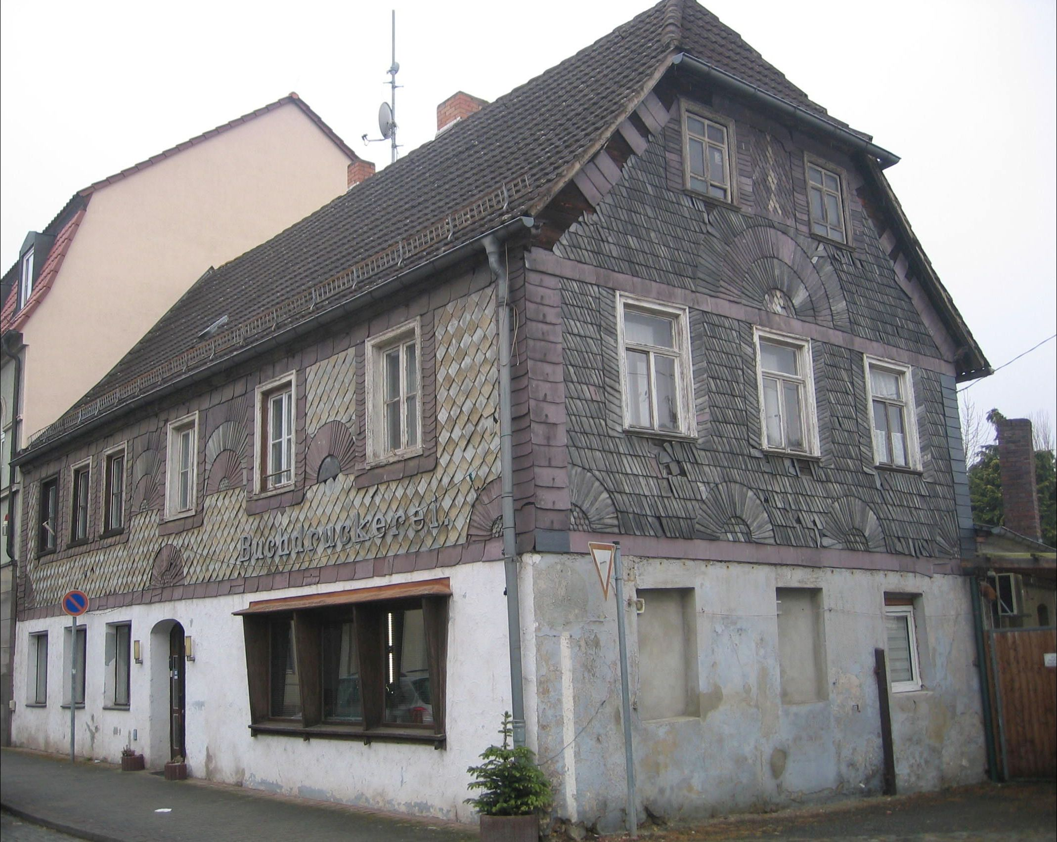 Ruhland, Berliner Straße 19, Nordostansicht; Wohn- und Geschäftshaus, Denkmalschutz; TV & Elektroservice, früher Druckerei Grubann